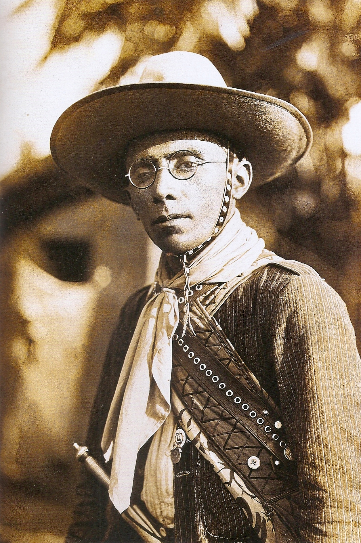 Virgulino Ferreira da Silva, "Lampião". (1897-1938). Fotografia em P&B, 16 x 11 cm. Acervo do Museu do Ceará - Fortaleza, CE, Brasil. O registro fotográfico foi realizado quando seu grupo invadiu e saqueou a cidade de Limoeiro do Norte, no interior do Ceará, em 15 de junho de 1927.